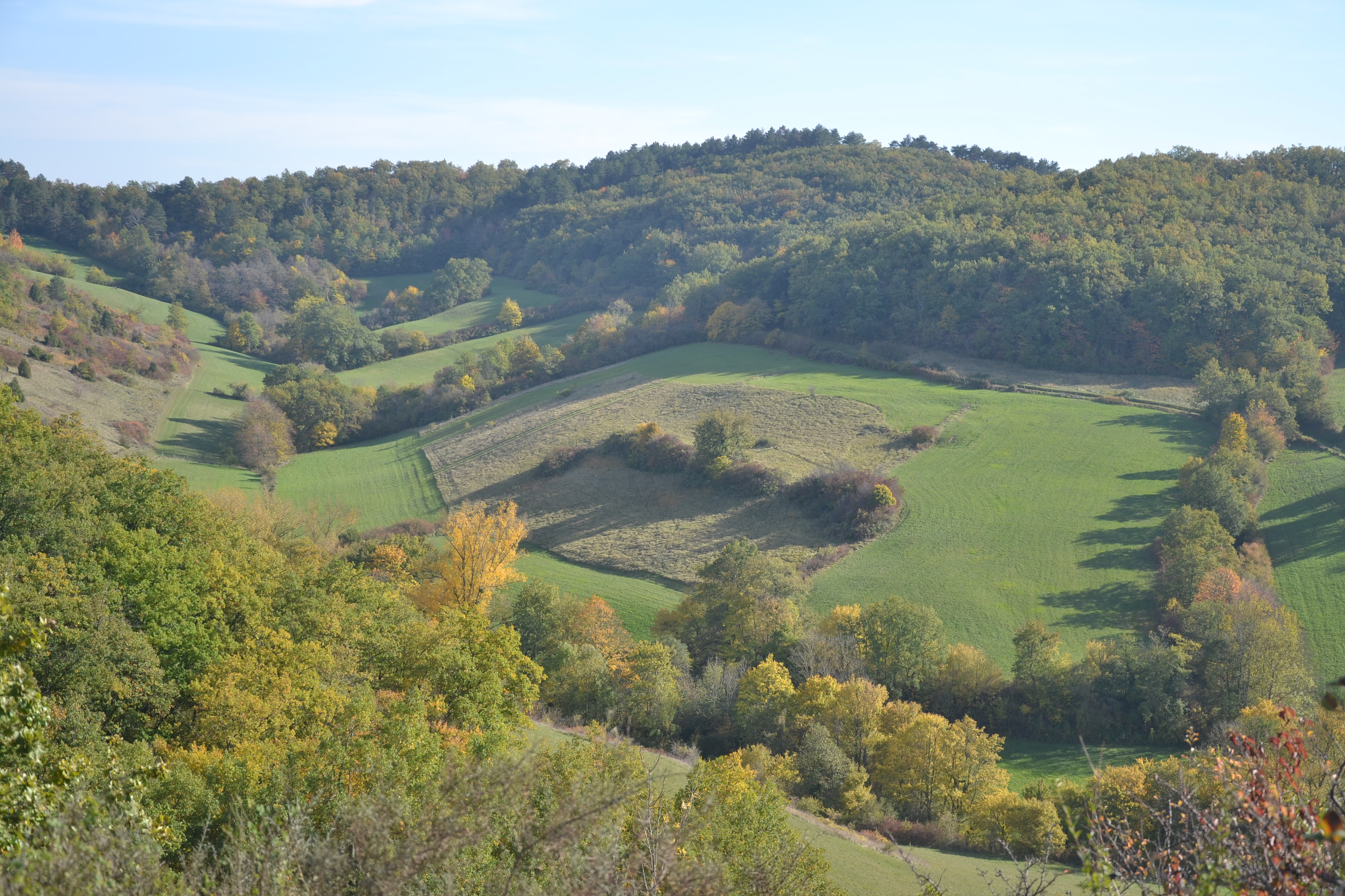 Paysage agricole près de Teilhet (Ariège, France).